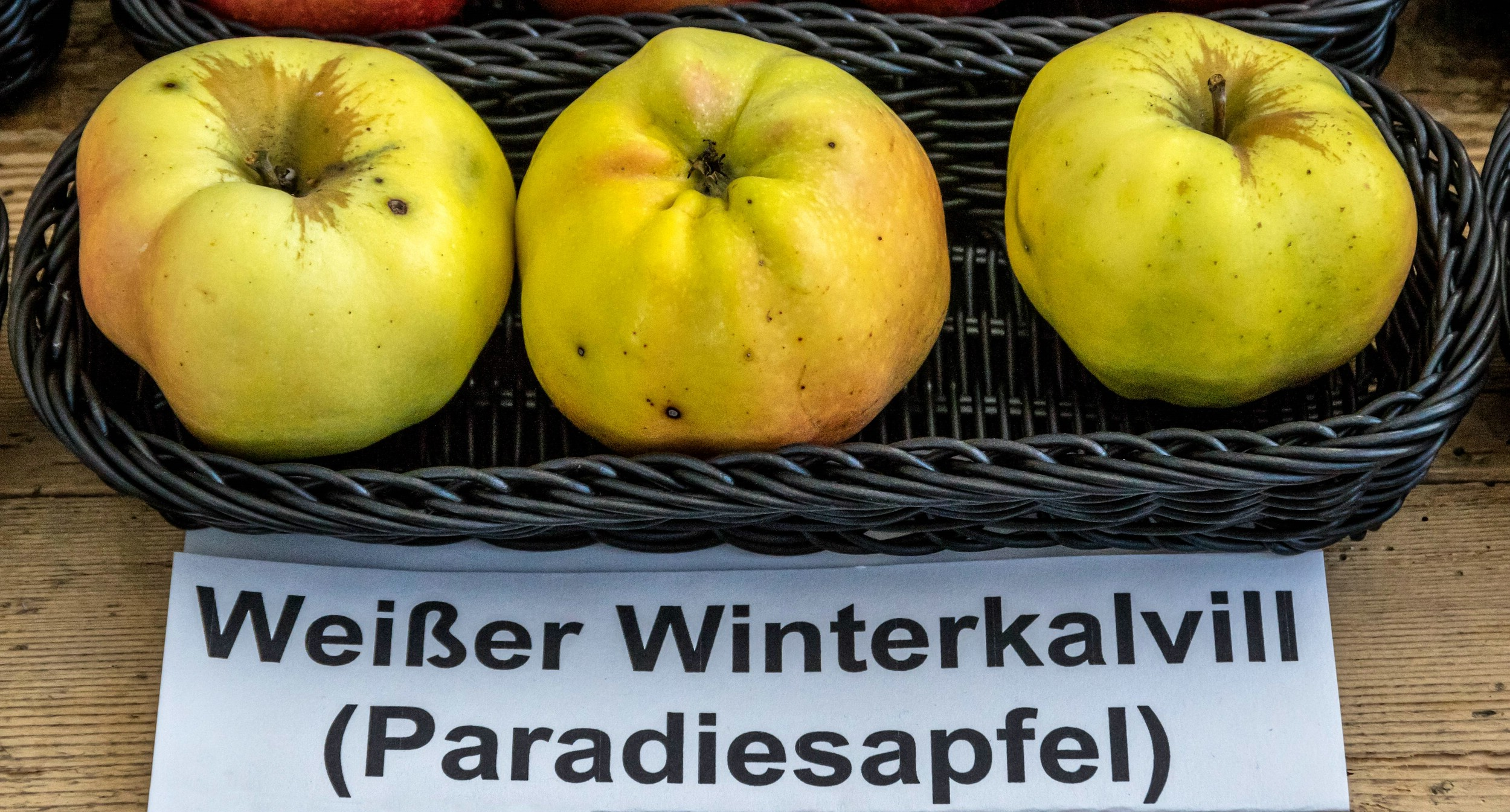 Alte Apfelsorten, von denen es im Badischen noch tragende Bäume gibt. Alle Aufnahmen au dem Oktober 2015